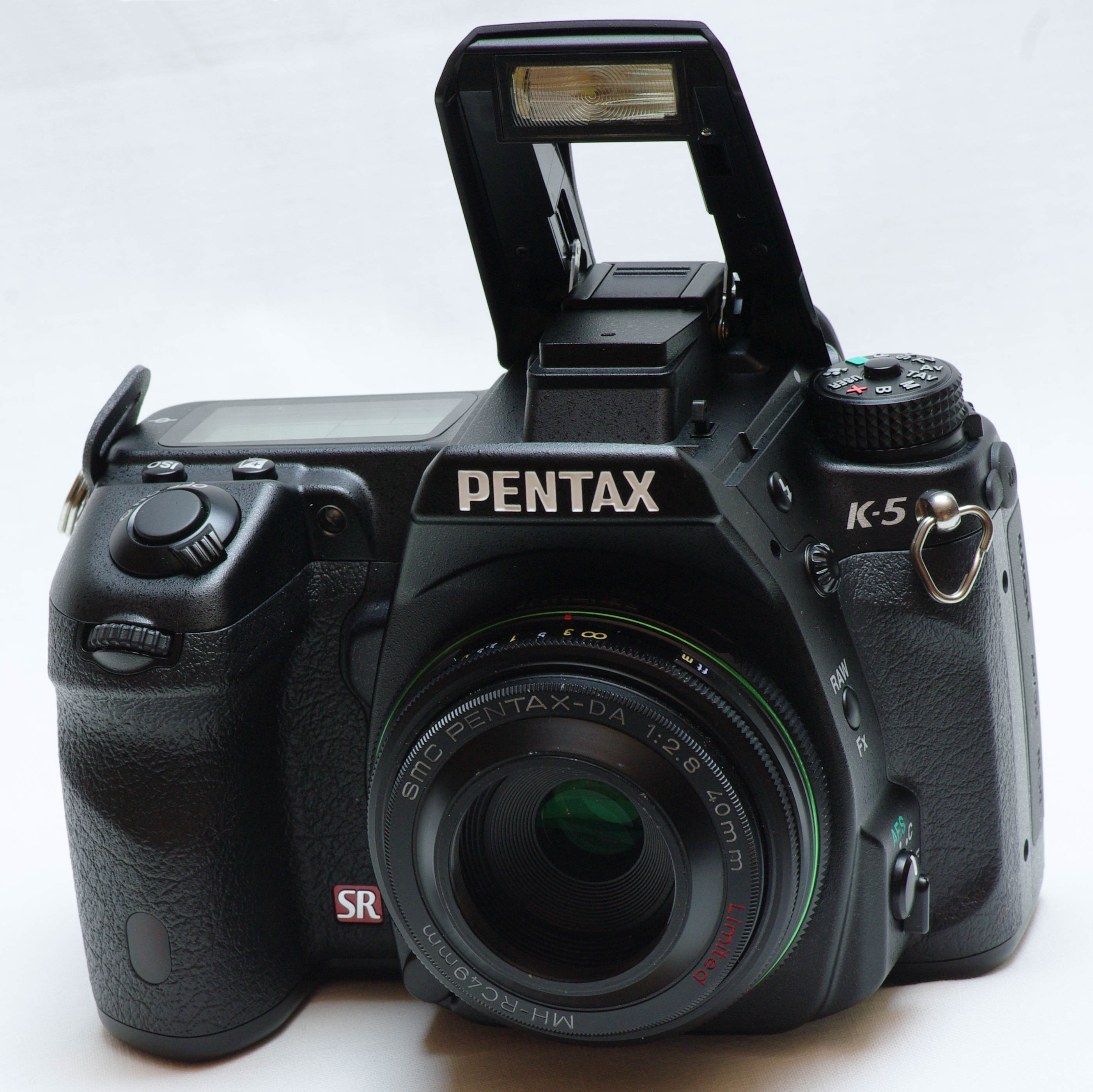 Pentax K-5 mit dem 40mm limited